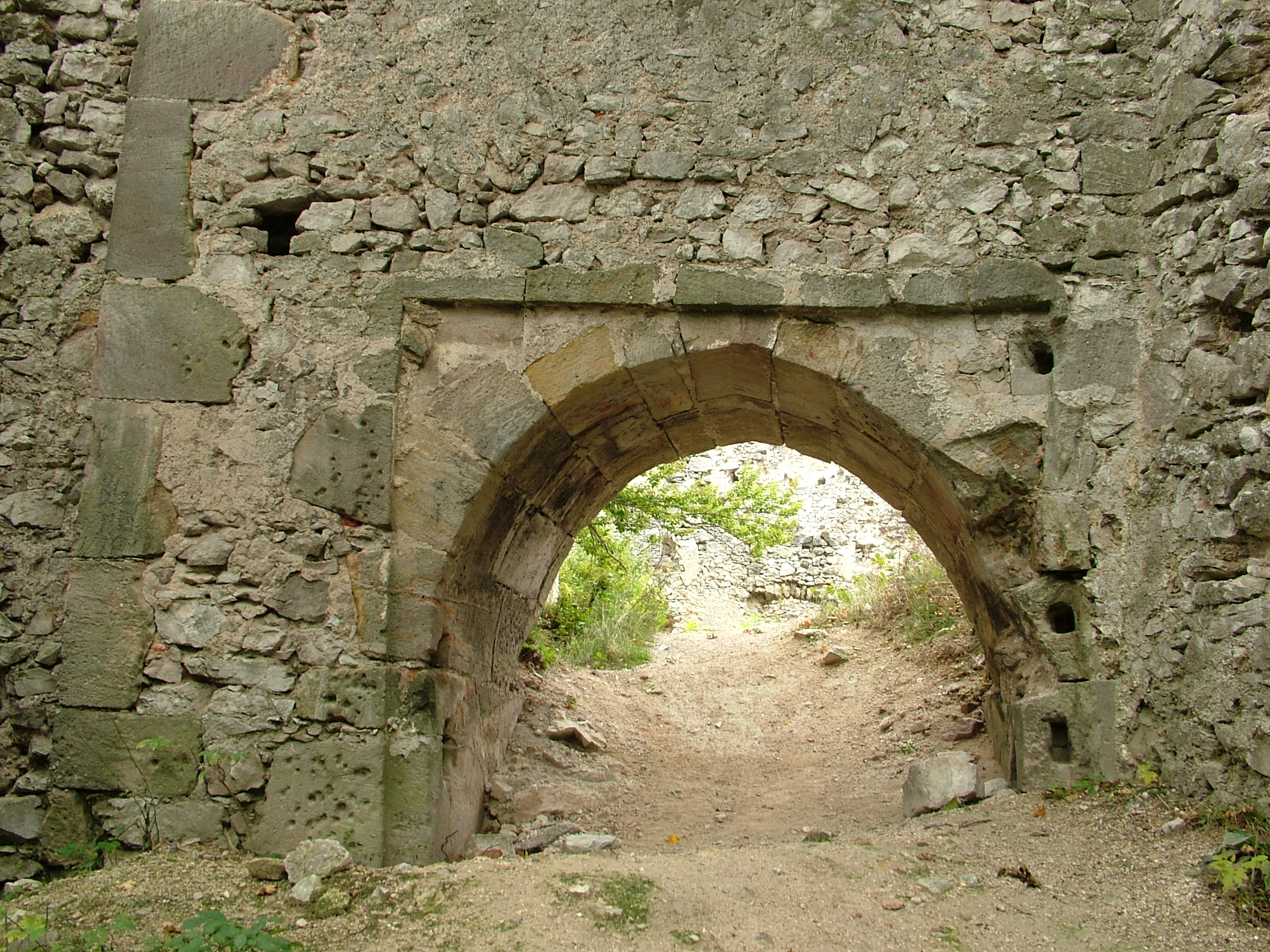 Hrad Tematín